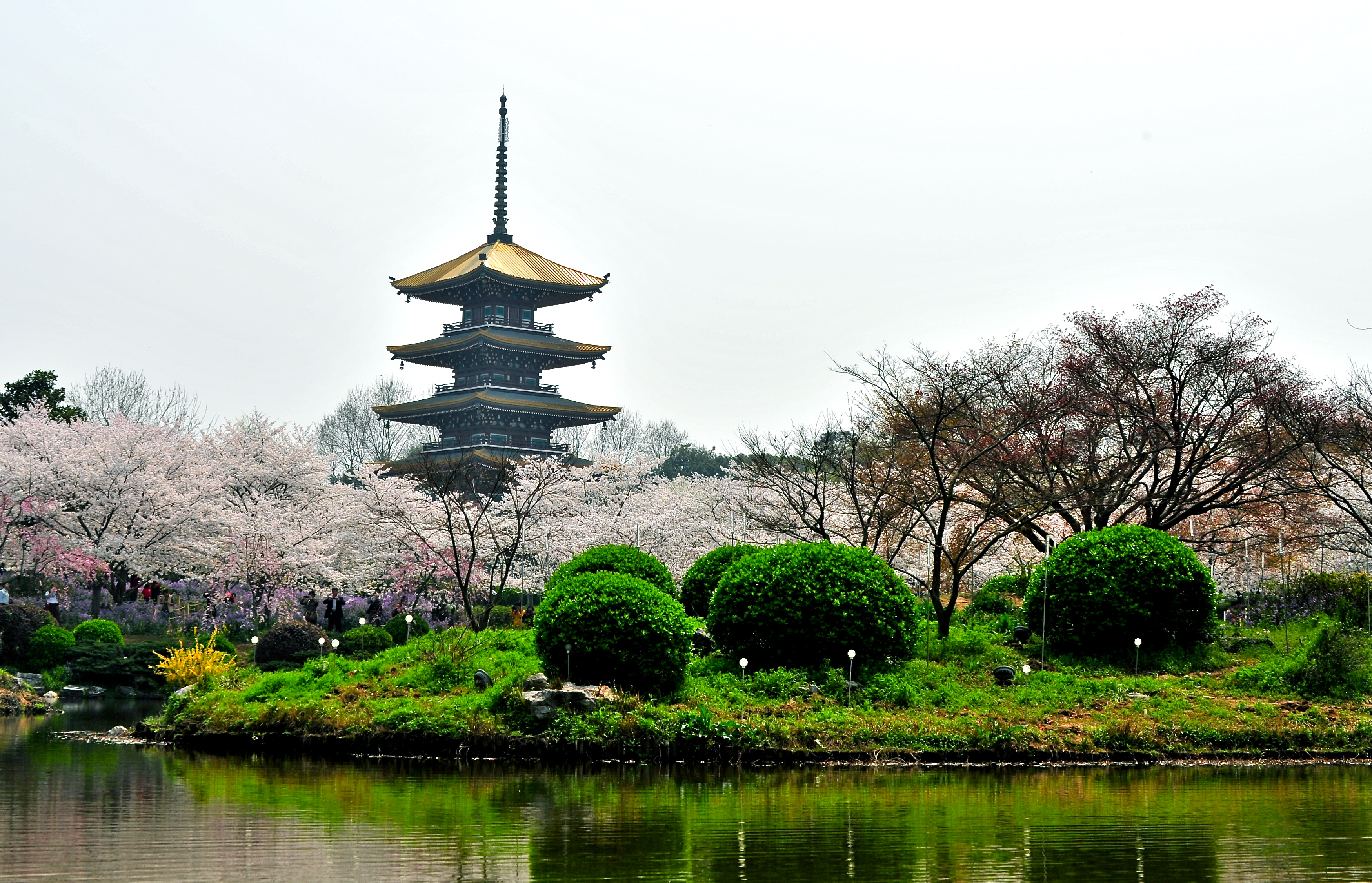 武漢東湖櫻花園